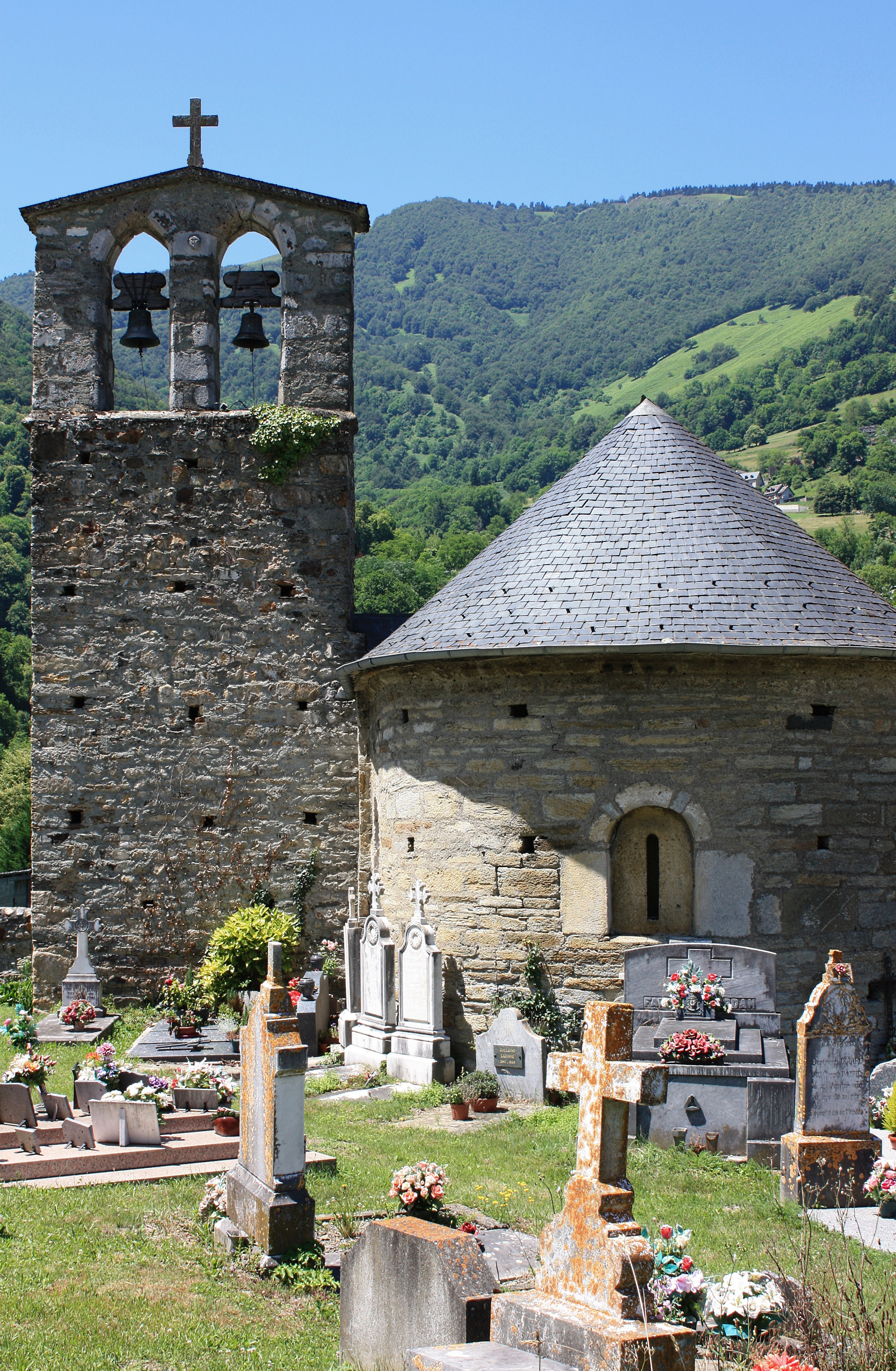 Burgalays - Chapelle Saint-André